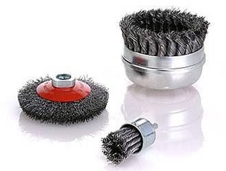 Pinsel-, Topf- und Kegelscheibenbürsten dienen der Bearbeitung von Metalloberflächen. Als Aufsatz auf Winkelschleifern, Bohrmaschinen und in Bearbeitungszentren beim Entfernen von Lacken, Zundern und Korrosion. Ebenfalls geeignet sind sie für schwer zugängliche Arbeitsbereiche, speziell für die Bearbeitung von Kanten und Ecken.